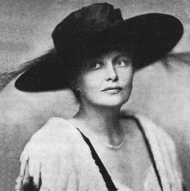 Hanna Granfelt, suomalainen oopperalaulaja